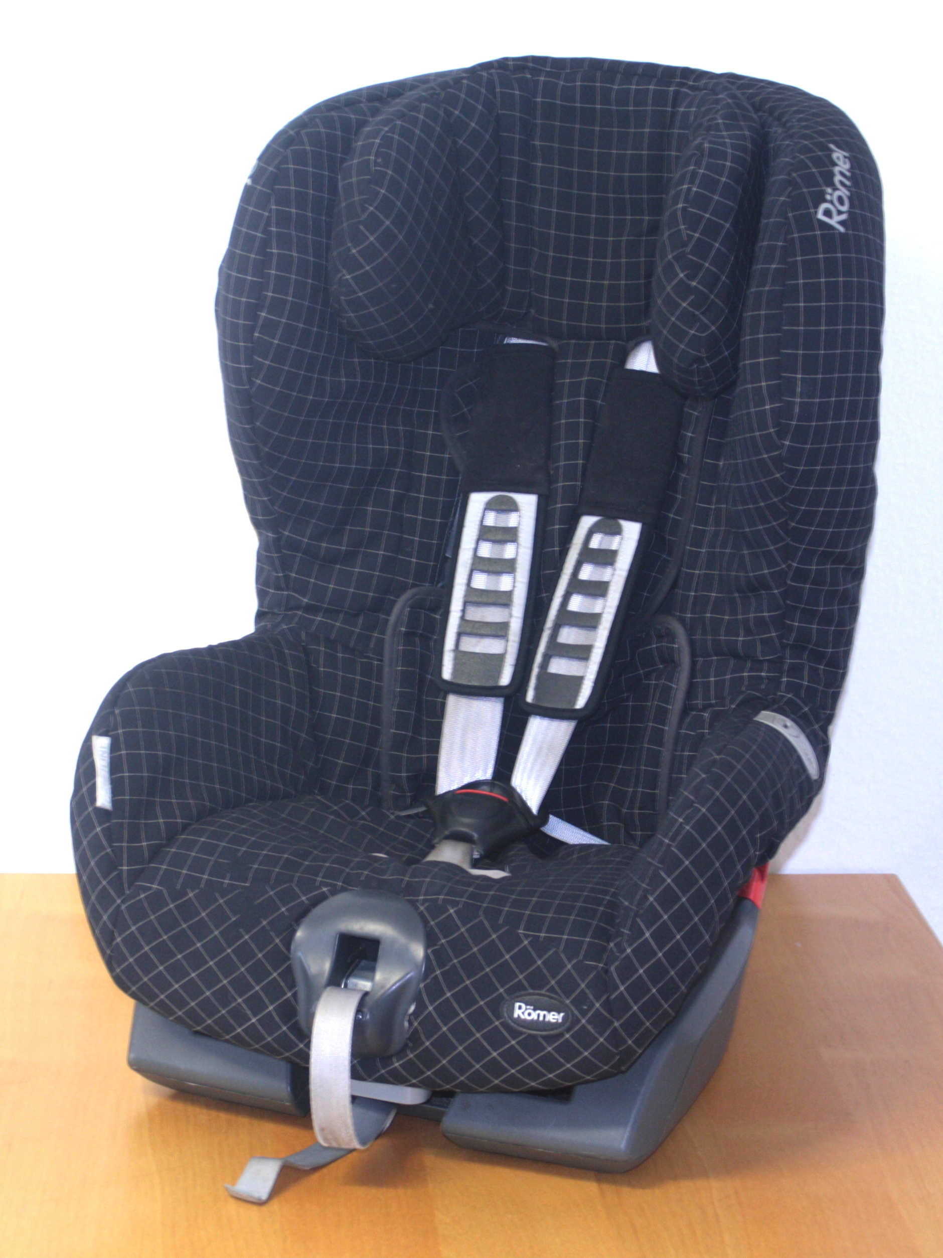 Kindersitz King Plus des Herstellers Römers mit ECE R44/04 Zulassung. Universal 9-18kg